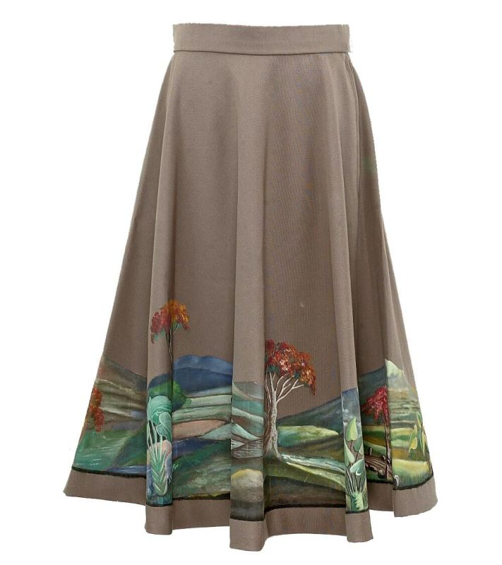 Rok. Rok met panoramische beschildering van Indonesisch landschap